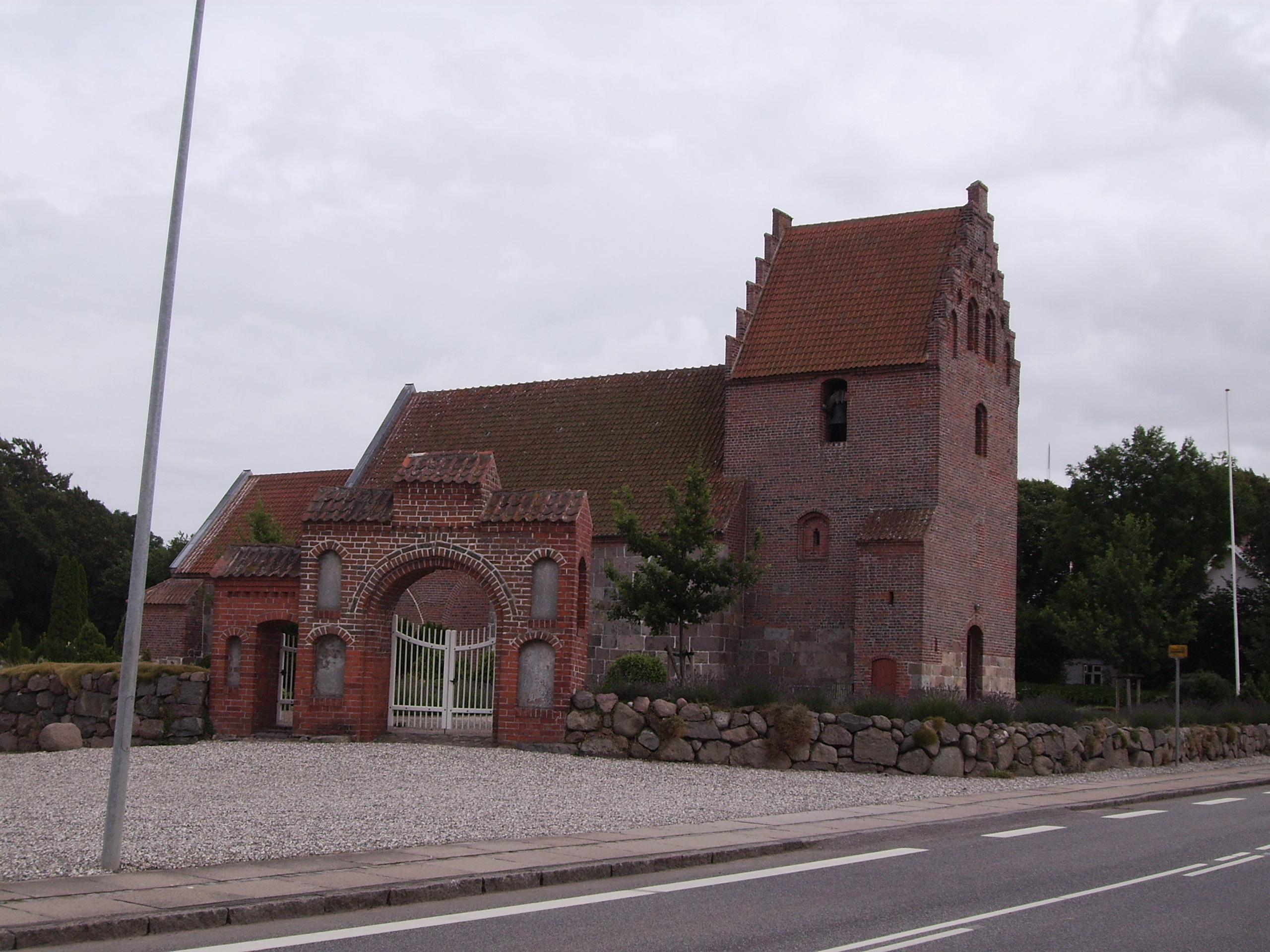 Grindløse Kirke, Grindløse Sogn, Skam Herred, Odense Amt, Denmark (Danish Church) - Grindløse Kirke fra nord